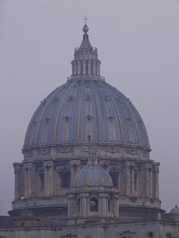 St. Peter's Dome, 2006 Cupola di San Pietro, 2006